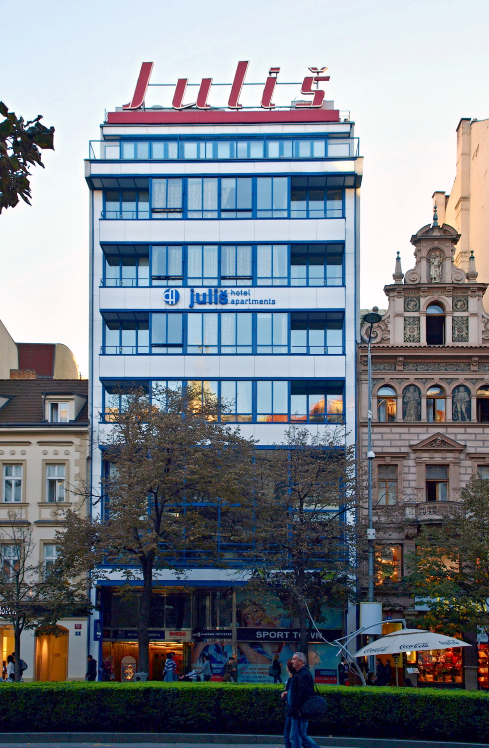 Hotel Juliš